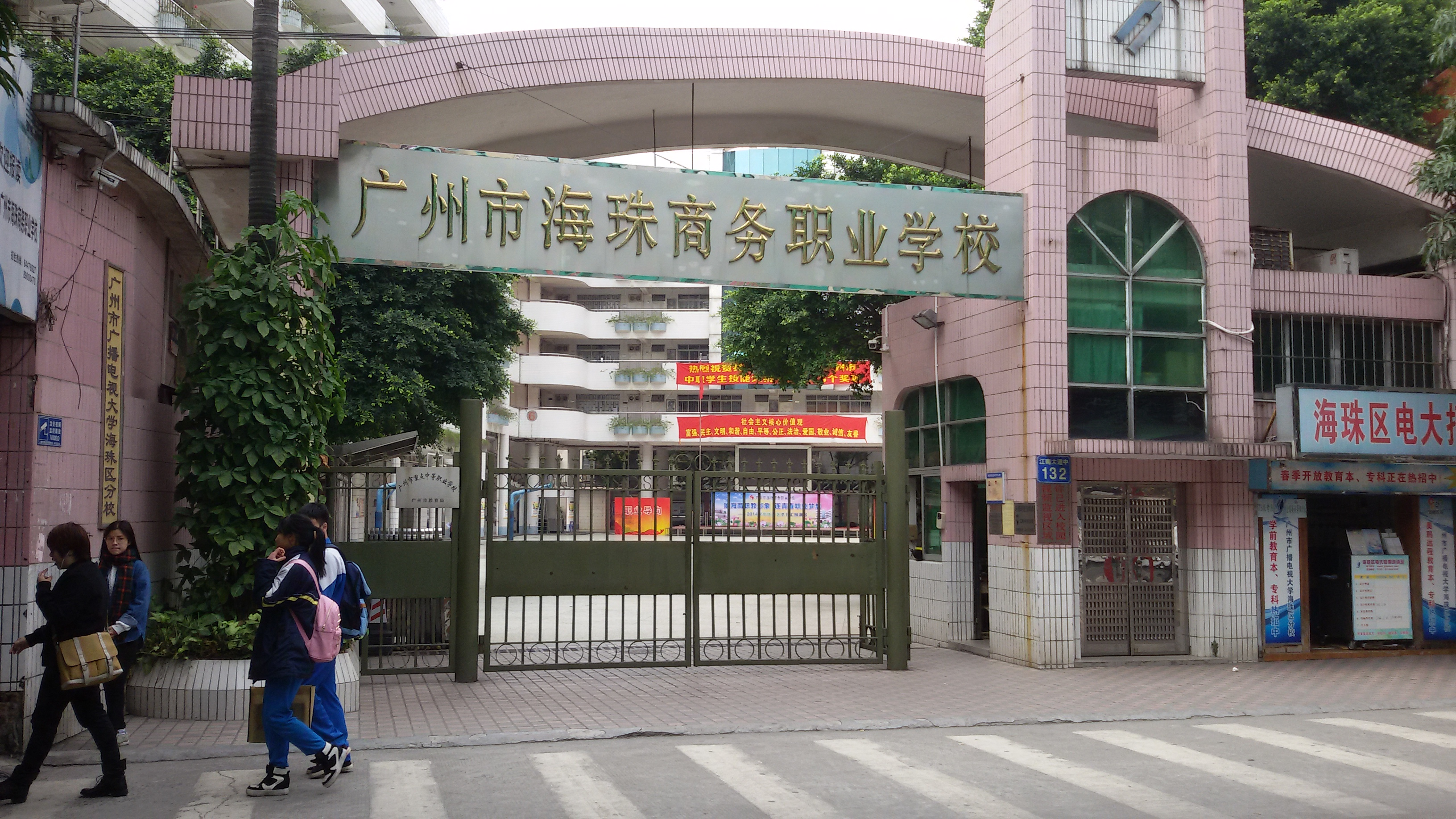 粵語: 廣州市海珠商務職業學校嘅江南中校區正門